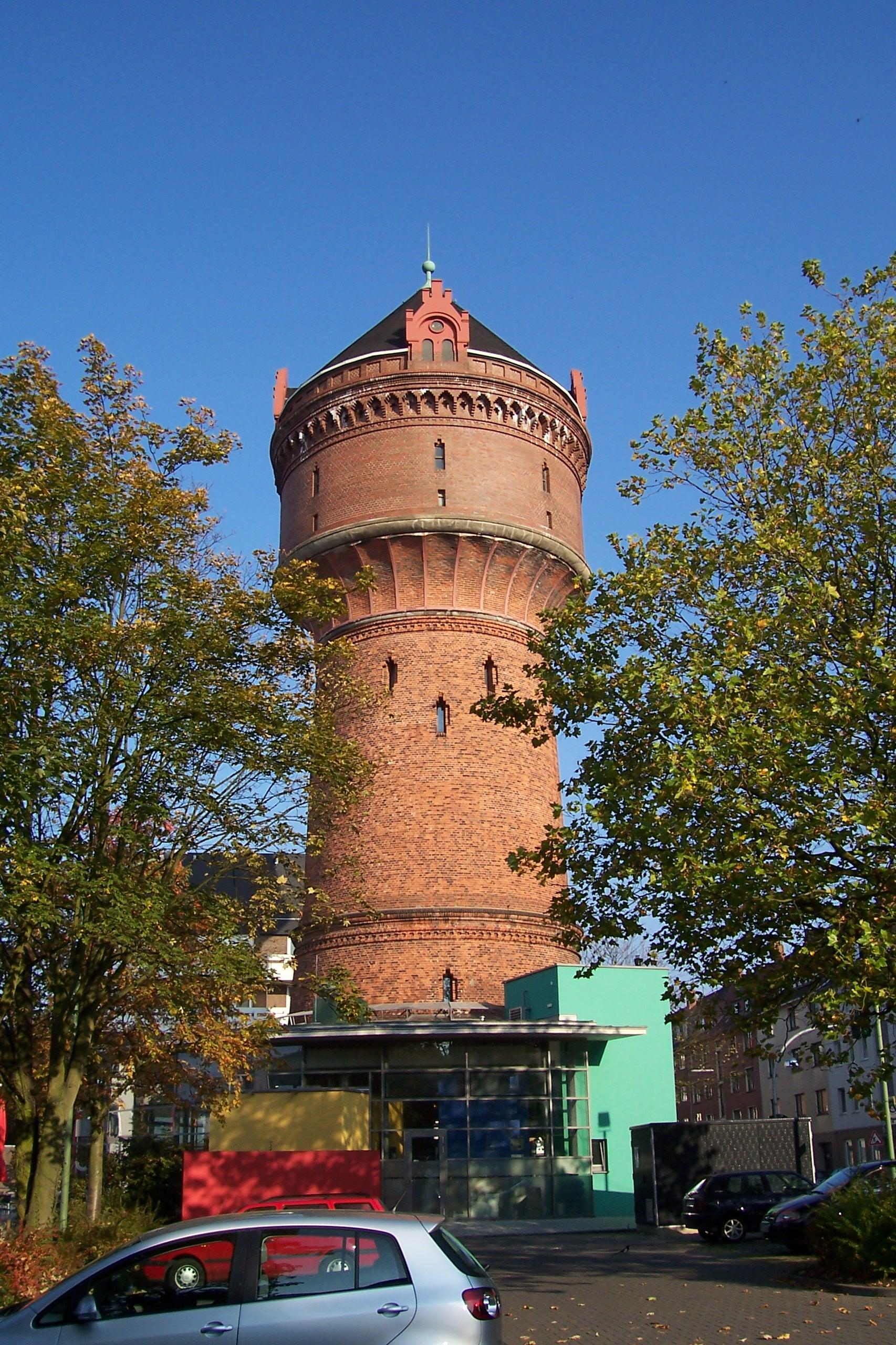 Wasserturm Bremerhaven-Geestemünde Das abgebildete Objekt ist ein geschütztes Kulturdenkmal in der Freien Hansestadt Bremen, mit der Nr. 1644 beim Landesamt für Denkmalpflege registriert.